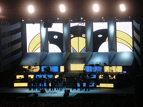 Esta vez, en el escenario fueron tres... Recital de Joan Manuel Serrat y Joaquin Sabina en la cancha de Rosario Central, Rosario, Argentina (27.11.2007). Les dejo un videito casero para la emoción